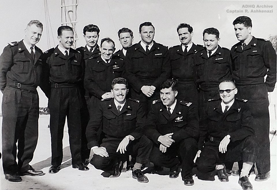 סגל ענף המודיעין הימי על גג בנין המפקדה ראובן אשכנזי שלישי מימין בין העומדים. ראש הענף אריה ברוש רביעי מימין.